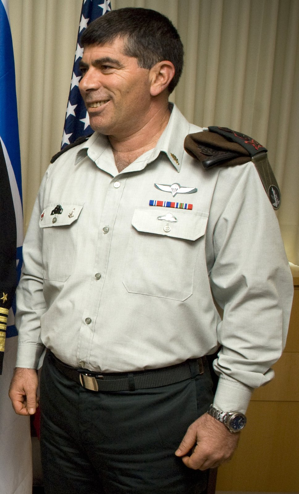 Gabi Ashkenazi